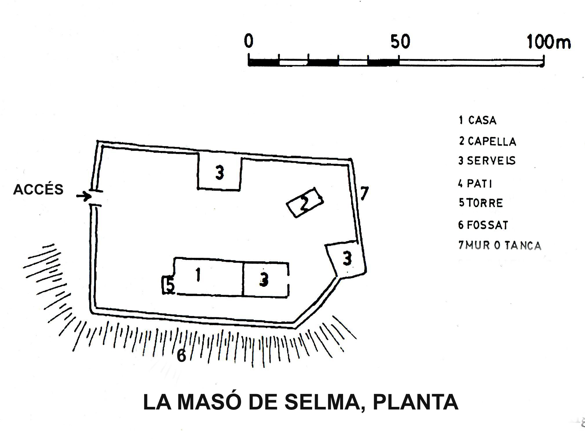 Planta esquemàtica de la Masó de Selma. Dibuix J. Fuguet